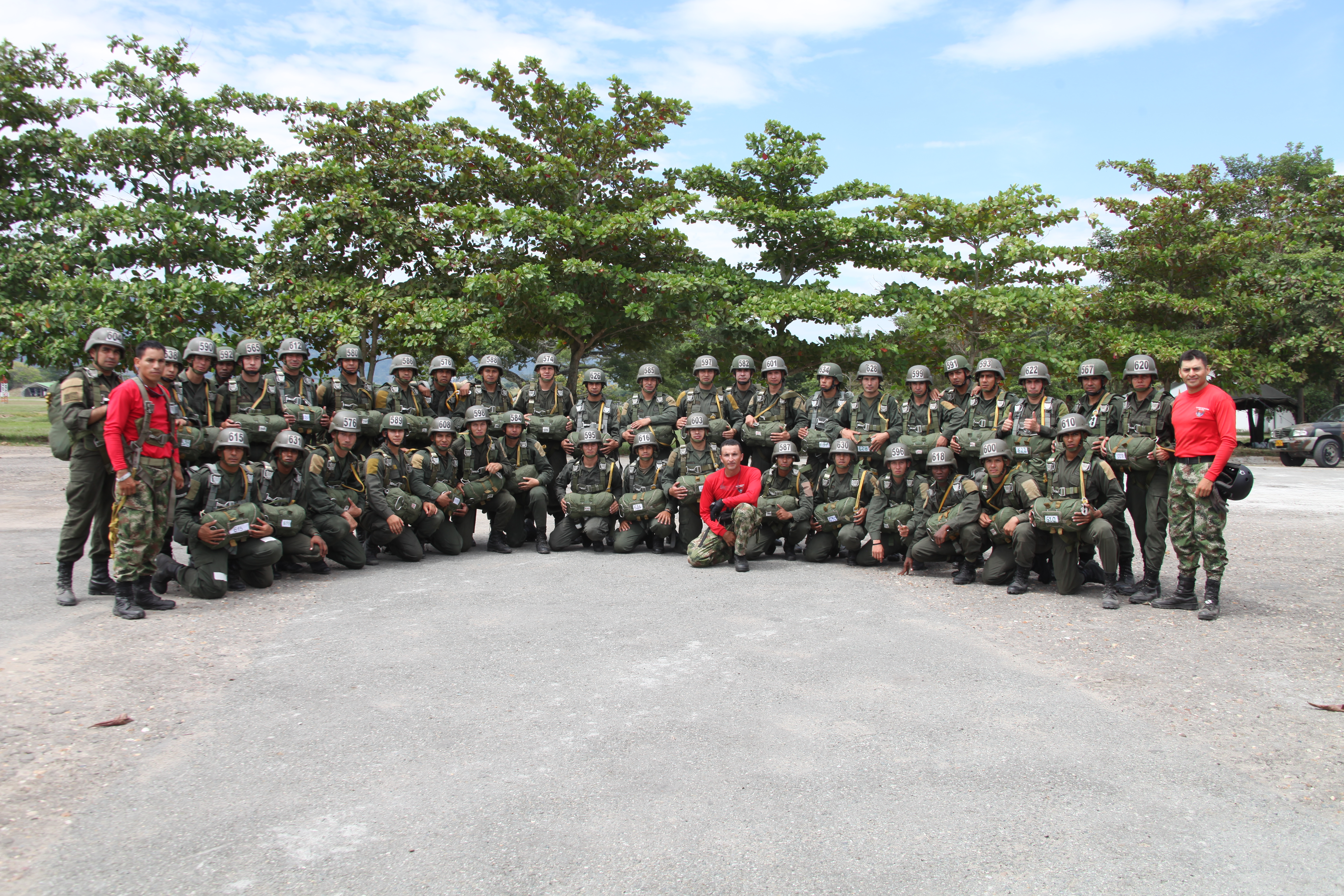 En el Centro de Instrucción Militar de la Fuerza Área Colombiana (CIMIL), en Puerto Salgar, Cundinamarca, fueron entrenados 50 comandos Jungla de la Dirección de Antinarcóticos en Paracaidismo Militar